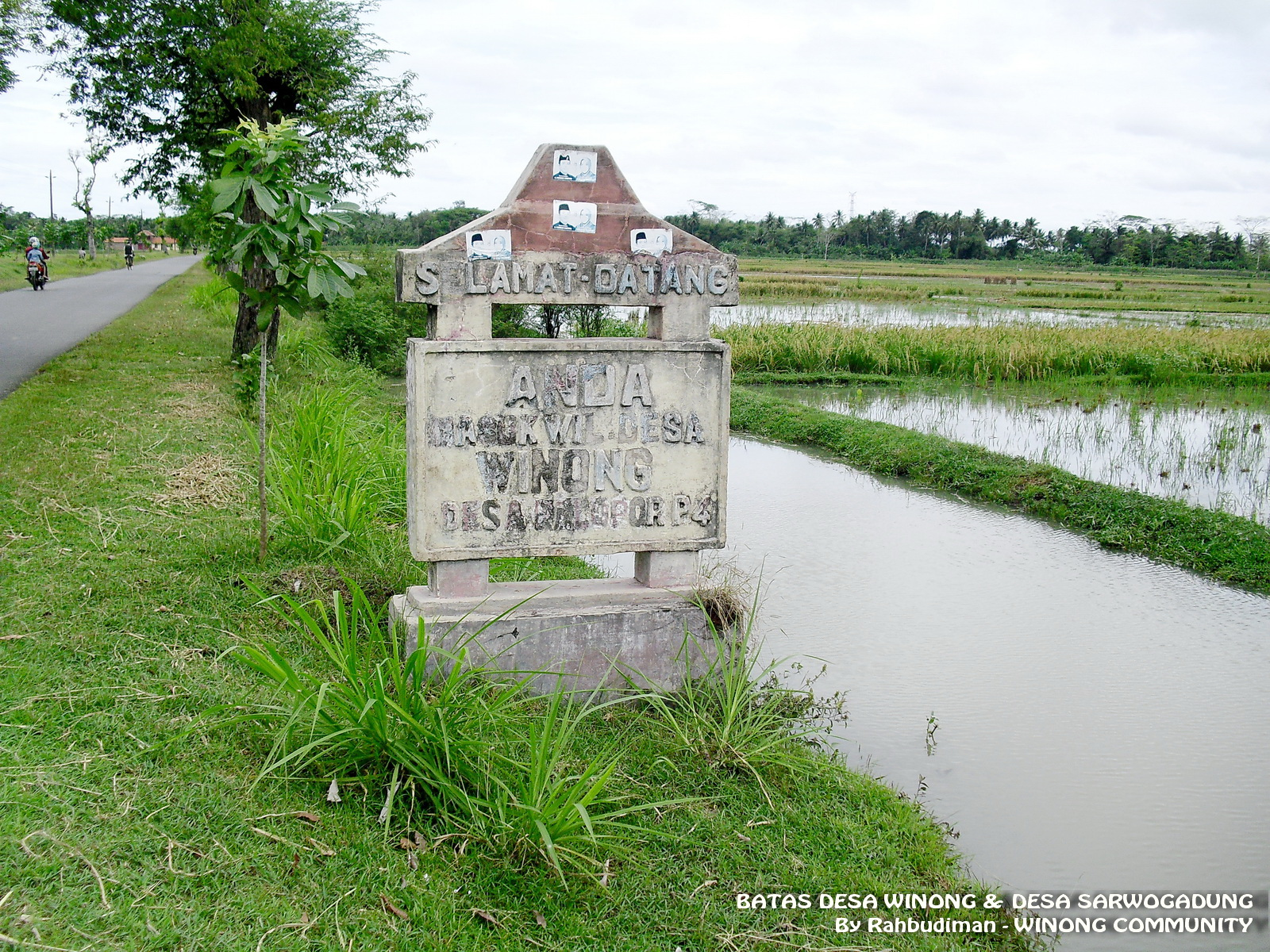 Batas Desa Winong & Desa Sarwogadung